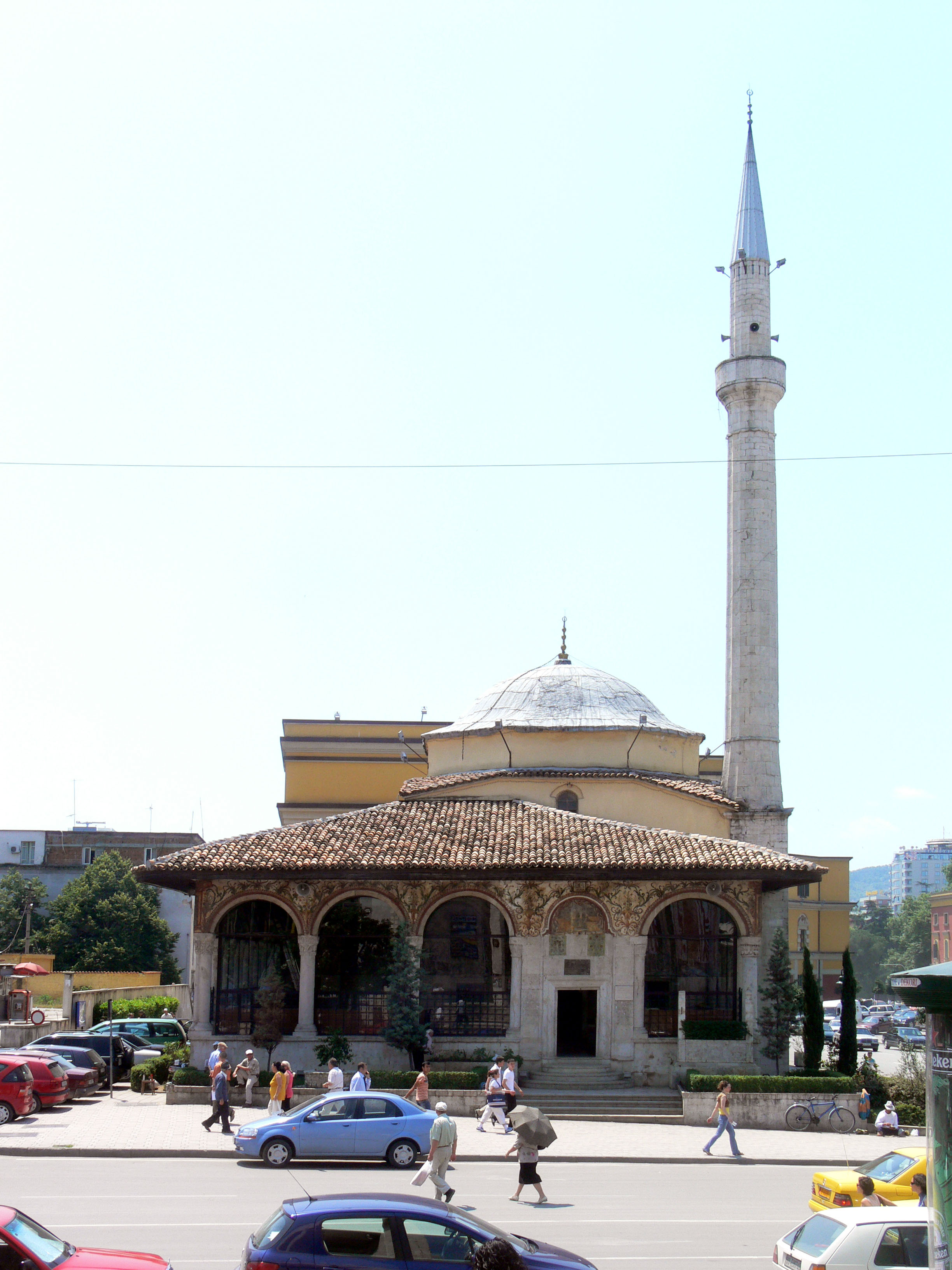 Tirana. Et'hem Beu-Mosque.